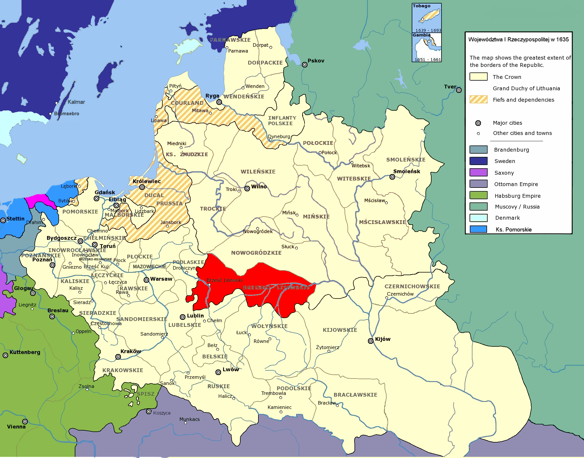 Brest-Litowsk voievodship in 1635